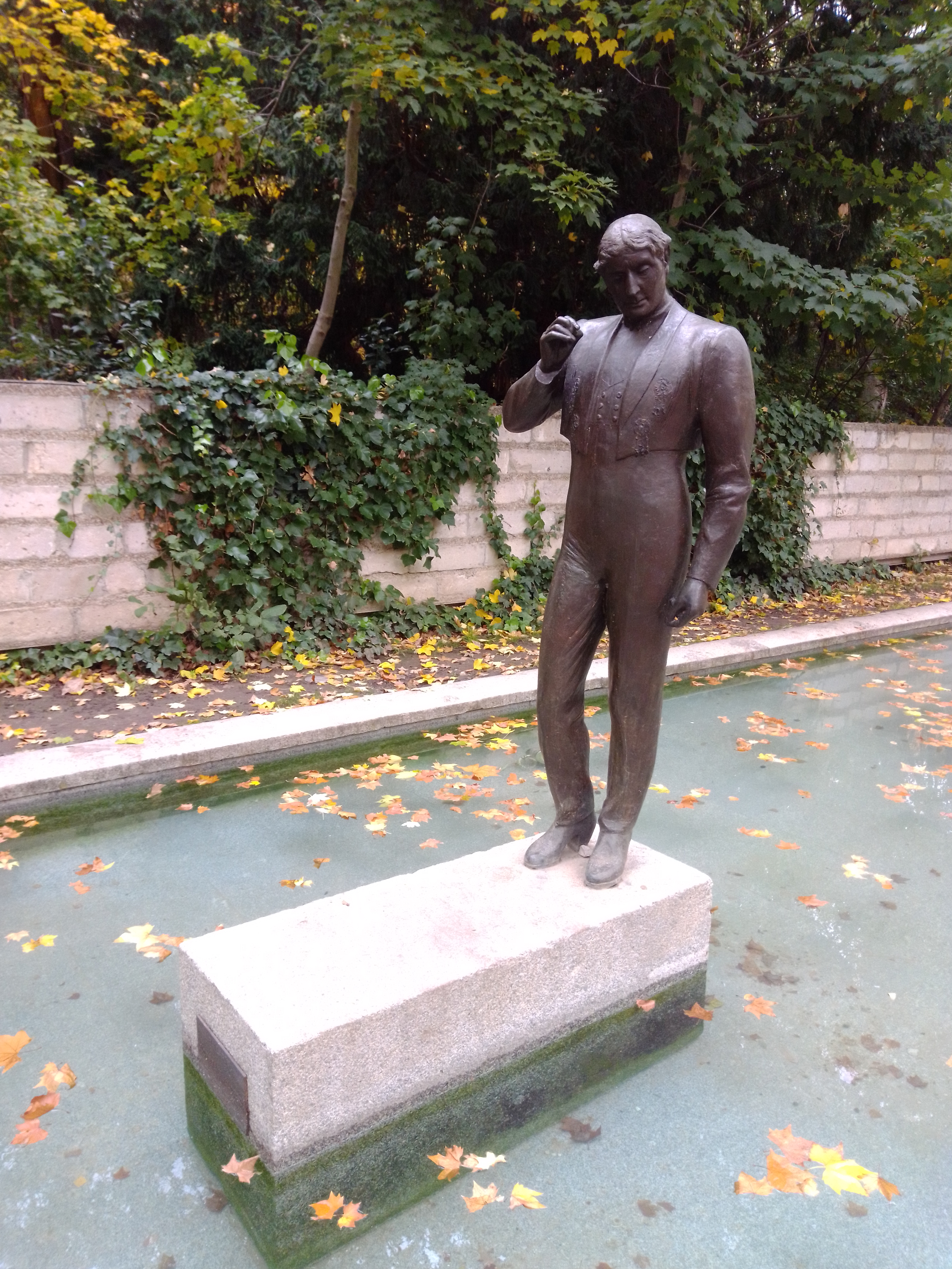 estatua del bailarin vicente escudero en el campo grande